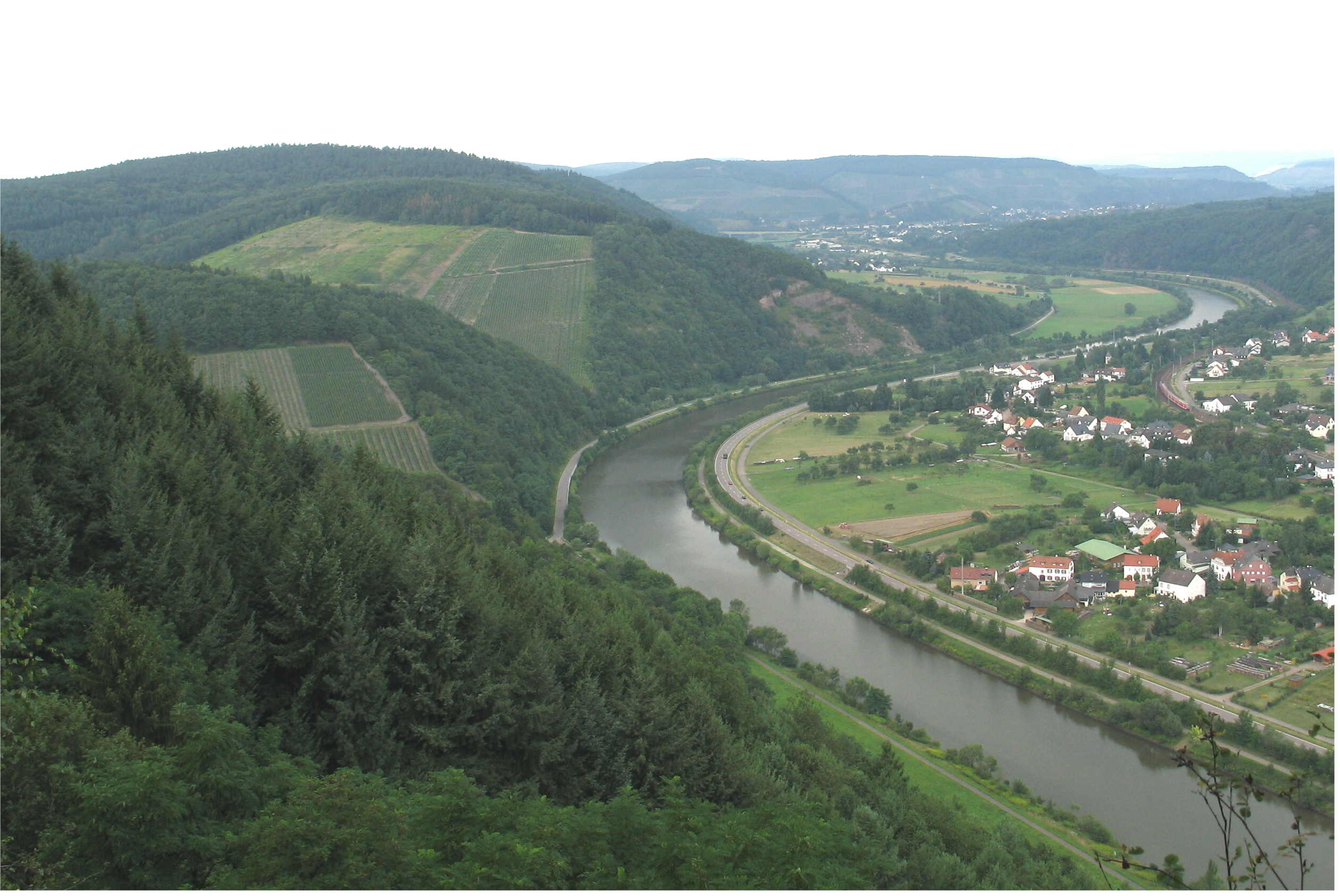 Vue vun der Klaus op d'Saar.